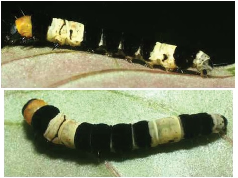 Ethmia lesliesaulae